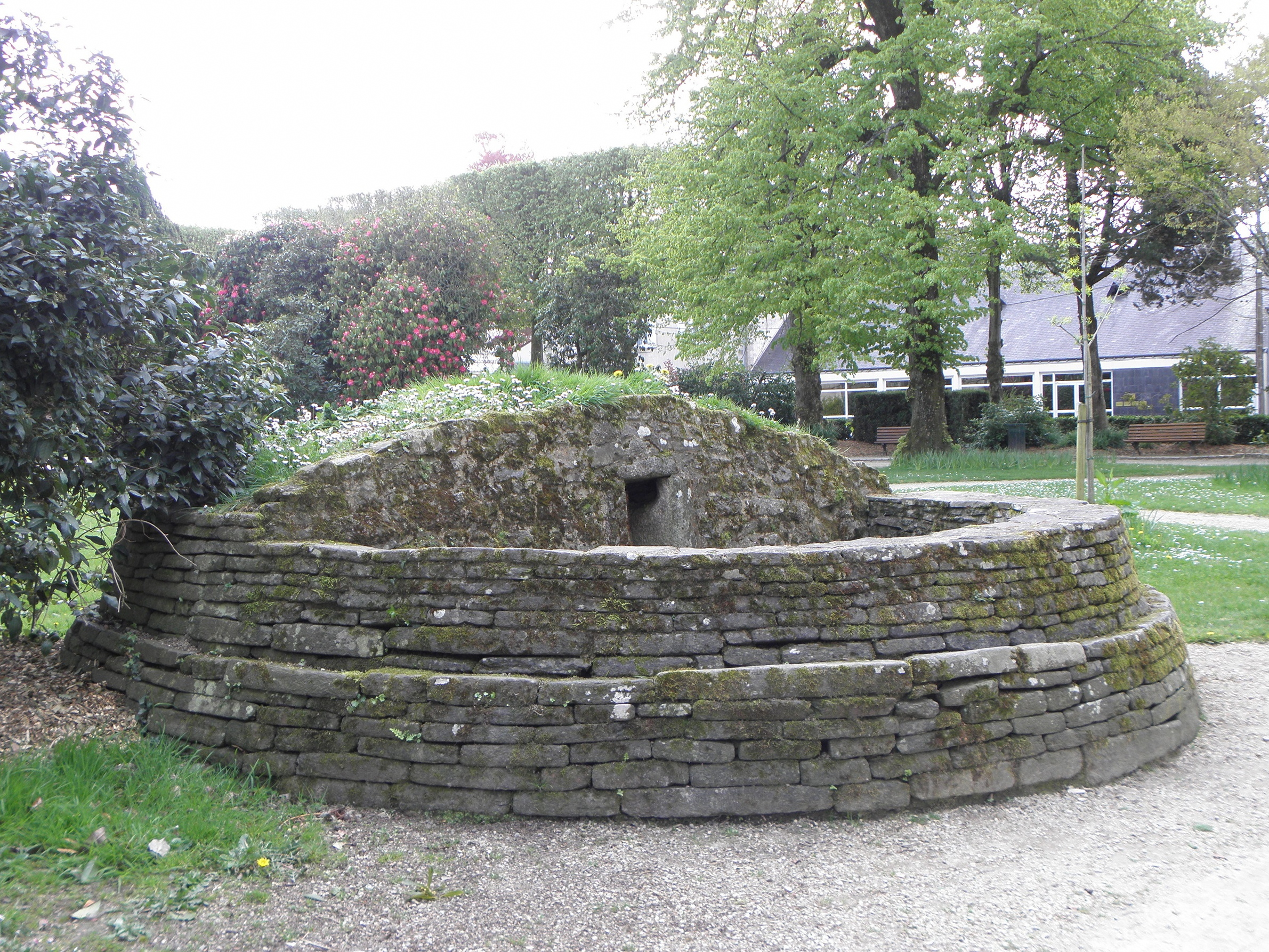 Tumulus de Nizillien sis square Saint-Joseph à Pontivy (56).